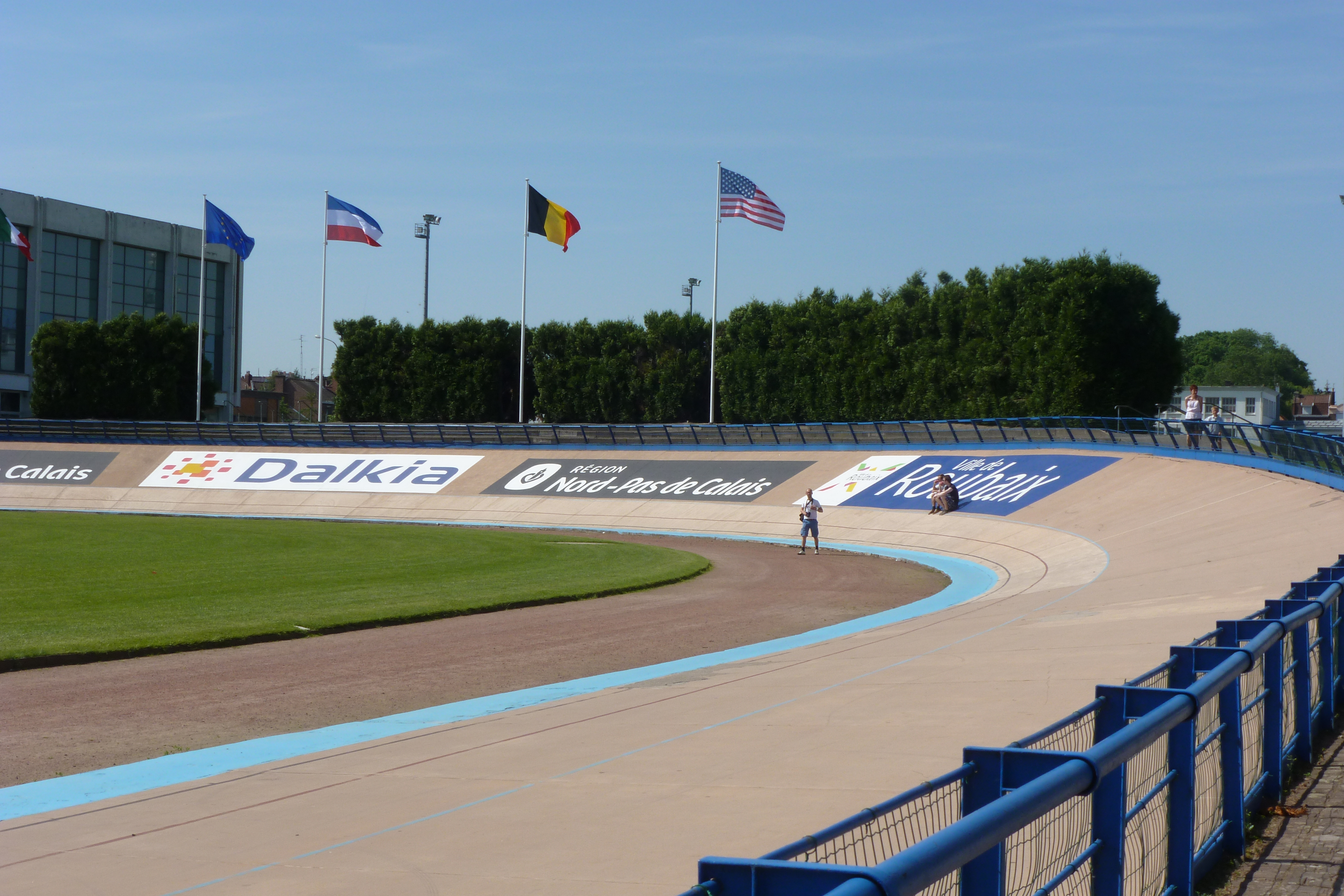 Radrennbahn André Pétrieux in Roubaix